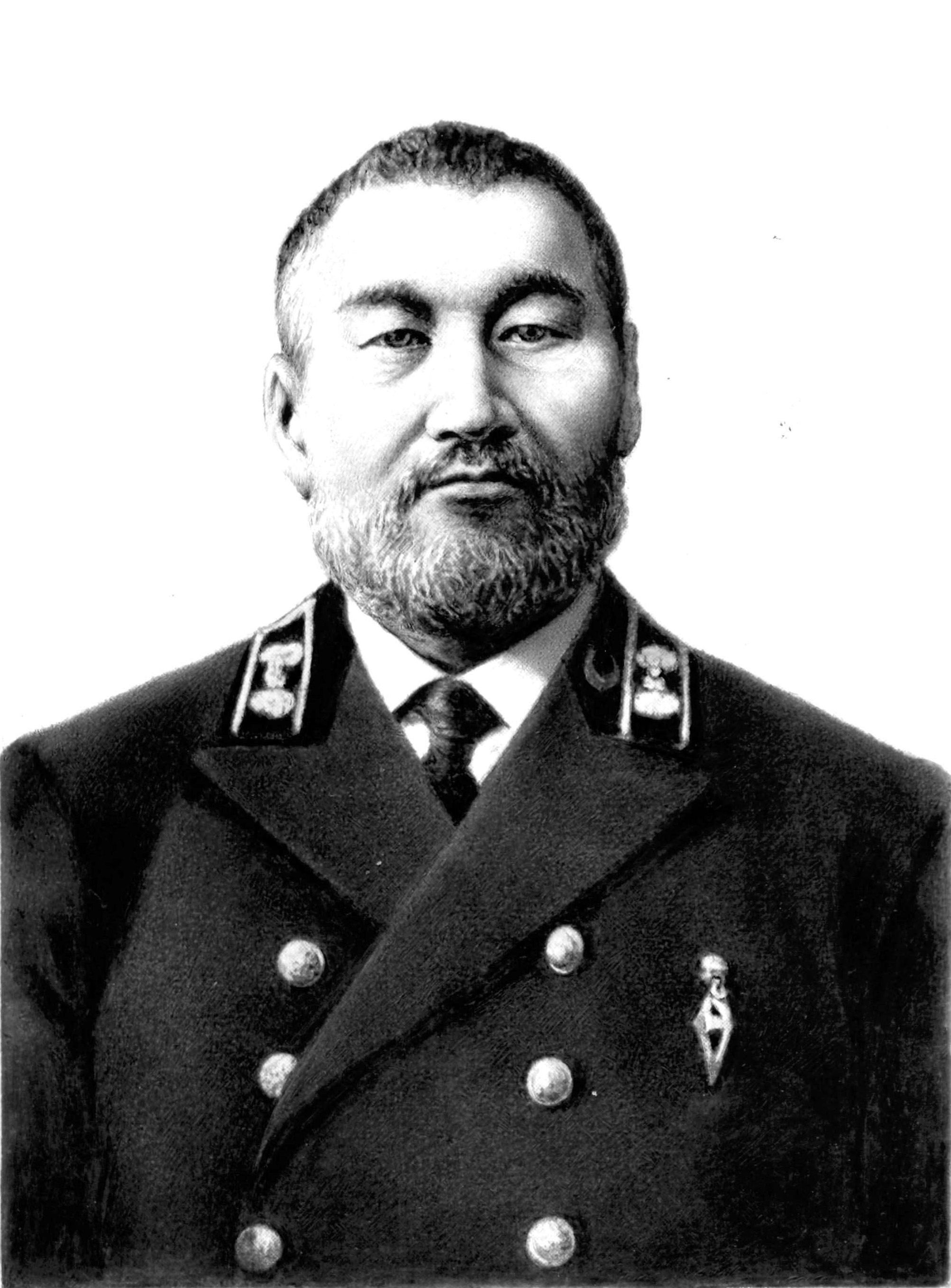 Профессор Катанов Н.Ф.